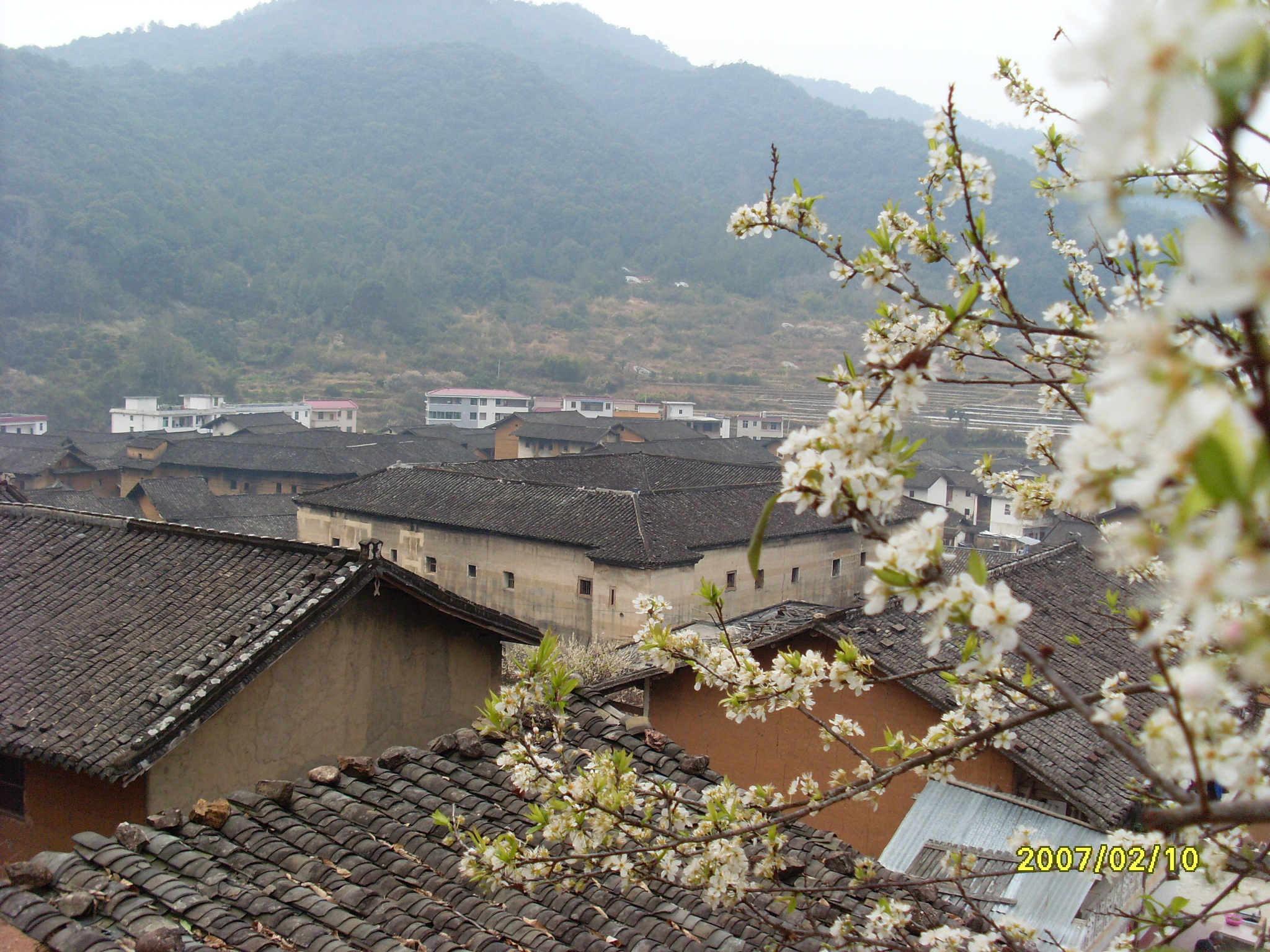 客家古村—蕉岭北礤